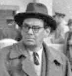 Leopold Sternberg (1896-1957), český šlechtic, příslušníkem konopišťské větve rodu Šternberků